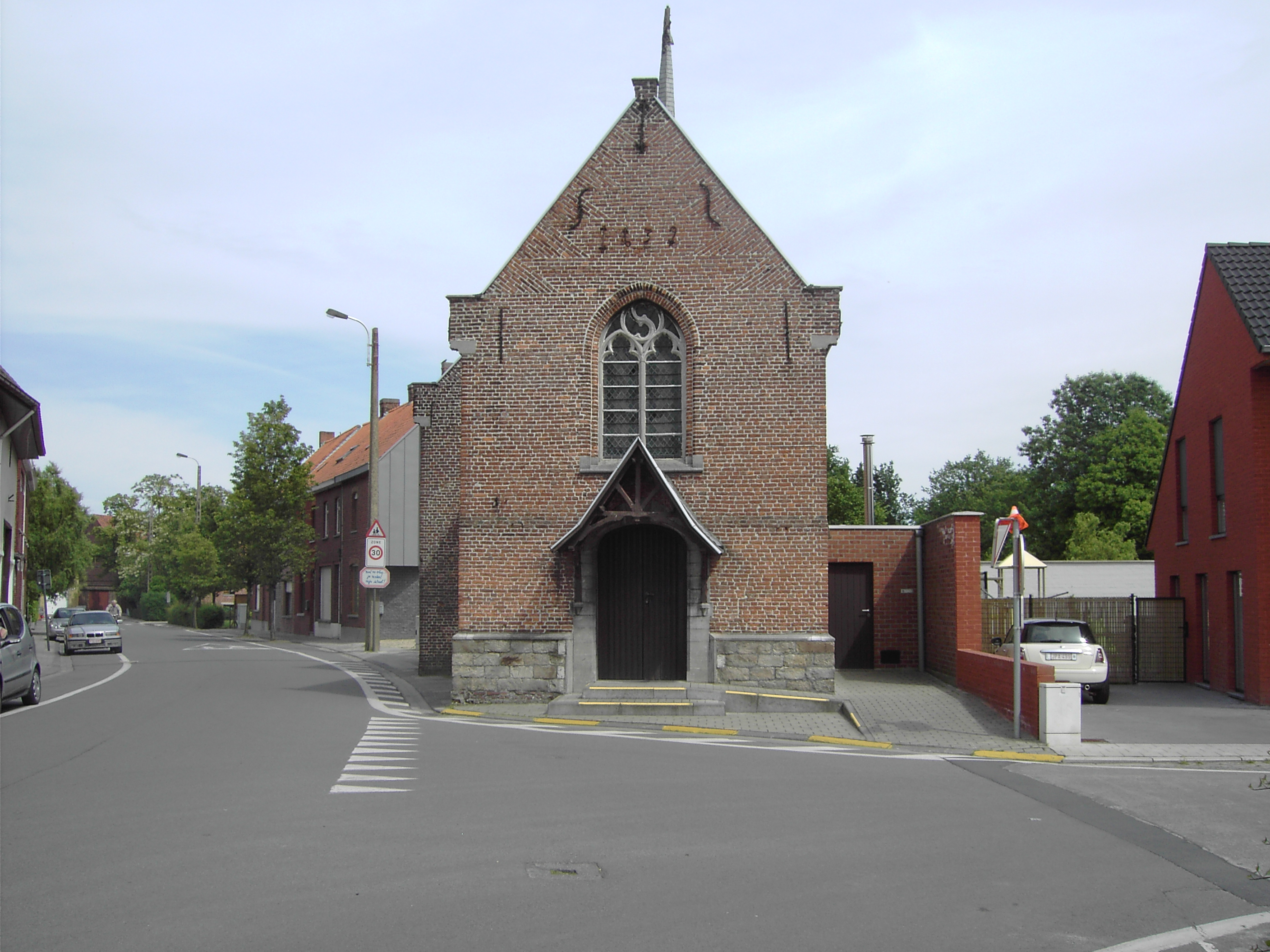 Het is een kapel in Deerlijk opgericht door Ridder de Casina ter verering van Onze-Lieve Vrouw